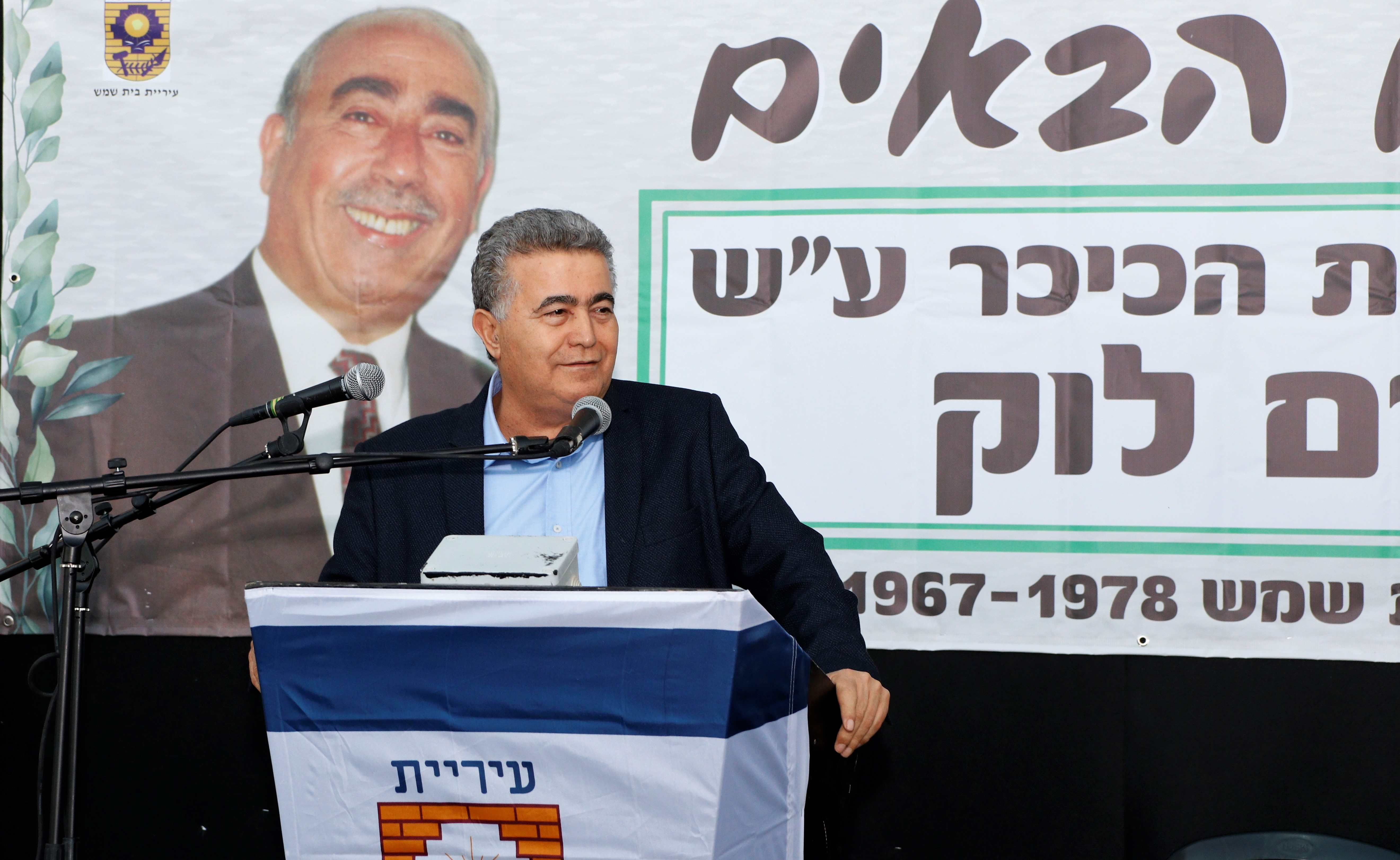 עמיר פרץ בטקס הסרת הלוט לכיכר עמרם לוק ראש המועצה הרביעי של בית שמש. קרדיט צילום: "רווח הפקות"